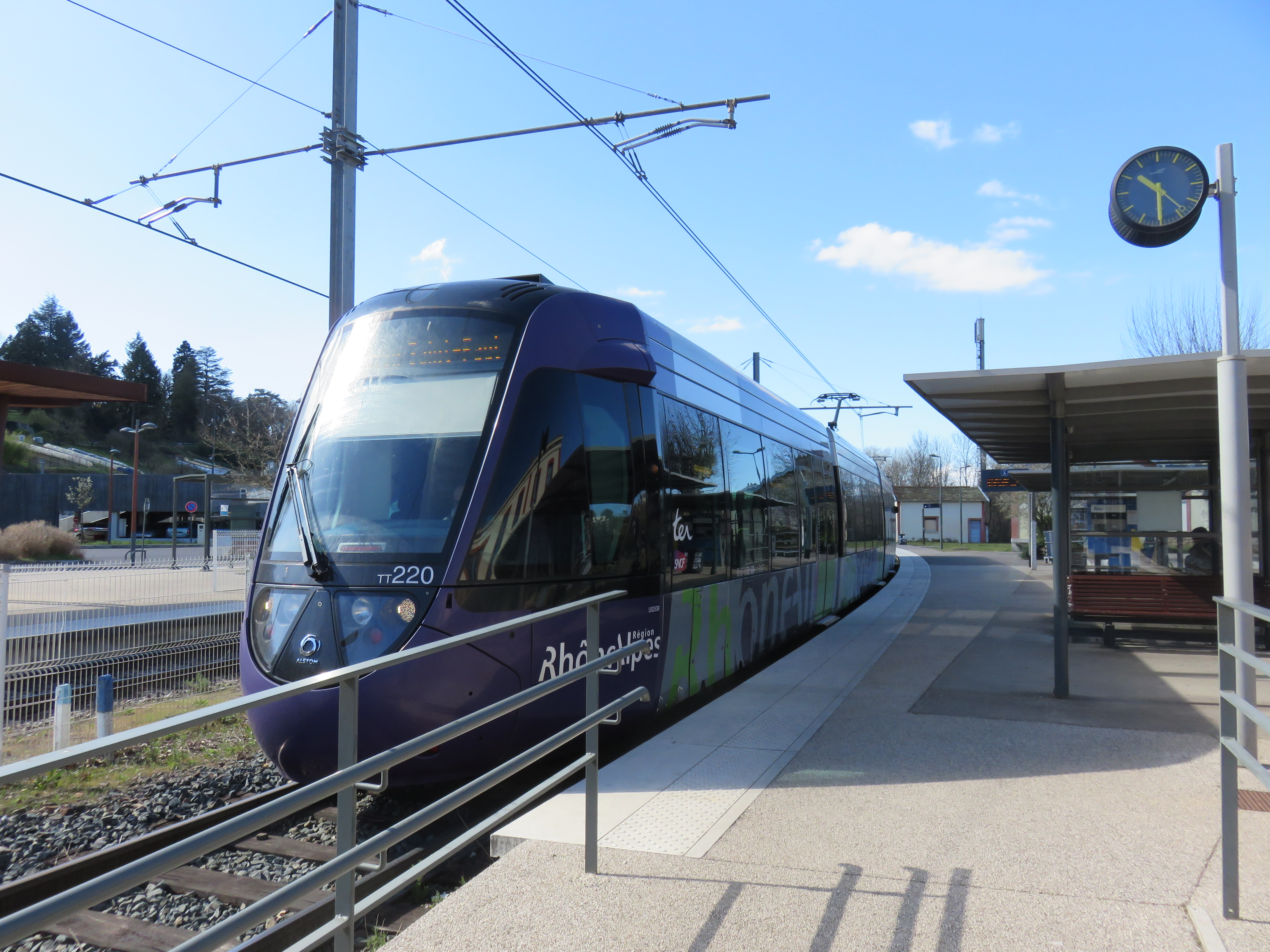 Un tram-train (TT220), en direction de Lyon-Saint-Paul, stationné en gare de L'Arbresle (Rhône, France).